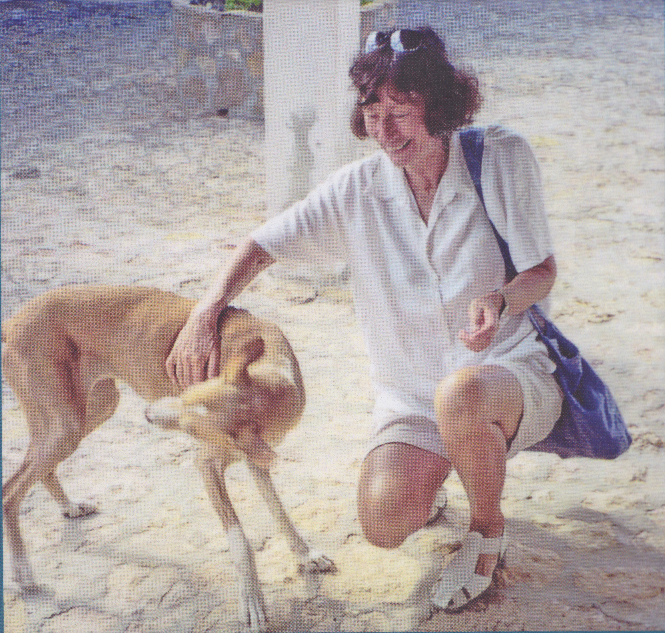 Rosemarie Egger mit Hund